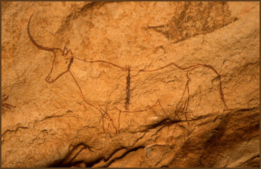 Peinture rupestre - site de Jabbaren - Tassili-n-Ajjer